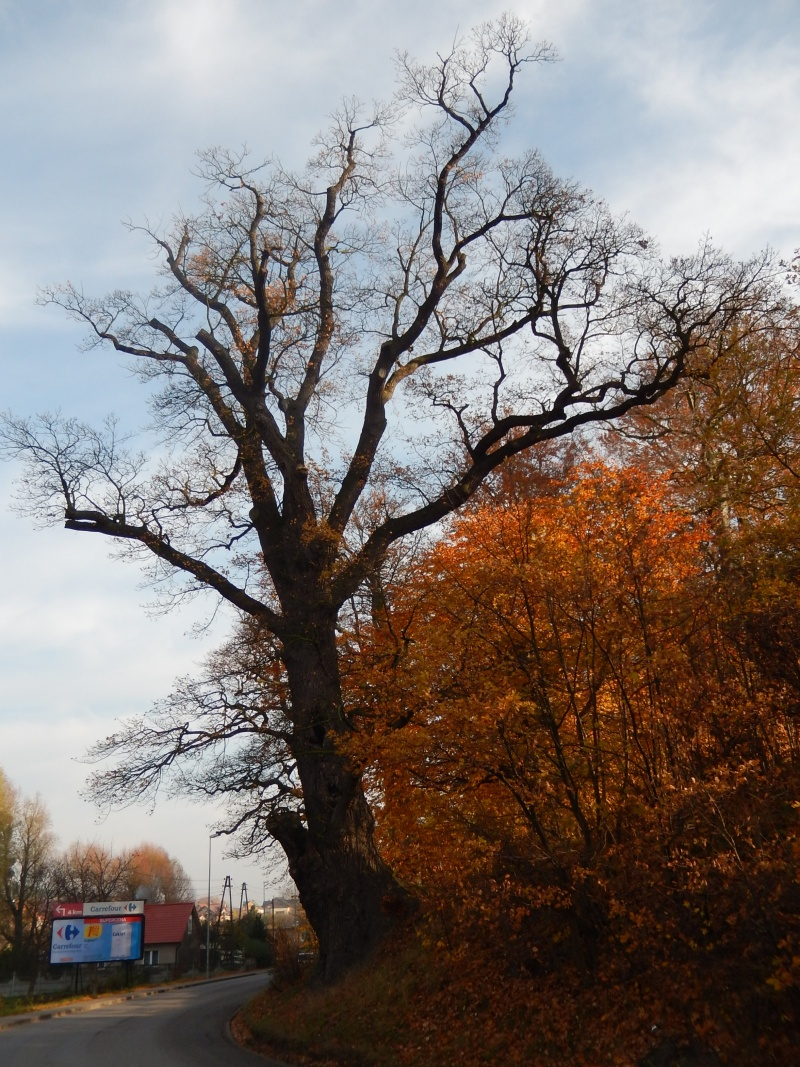 551 Dąb szypułkowy - pomnik przyrody - na skarpie ul. Niepołomicka. Podnóże Góry Luizy.